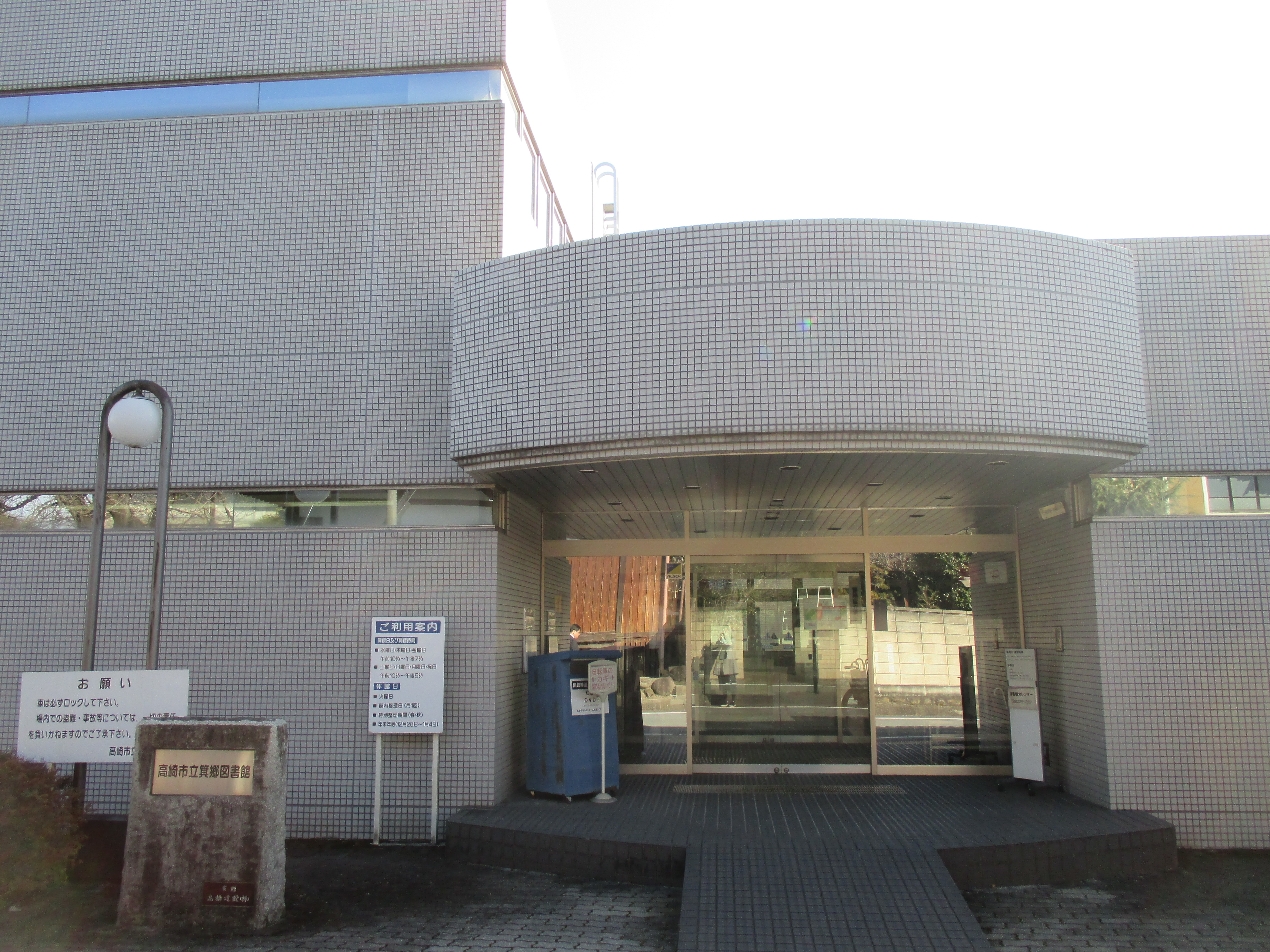 箕郷図書館（外観正面）